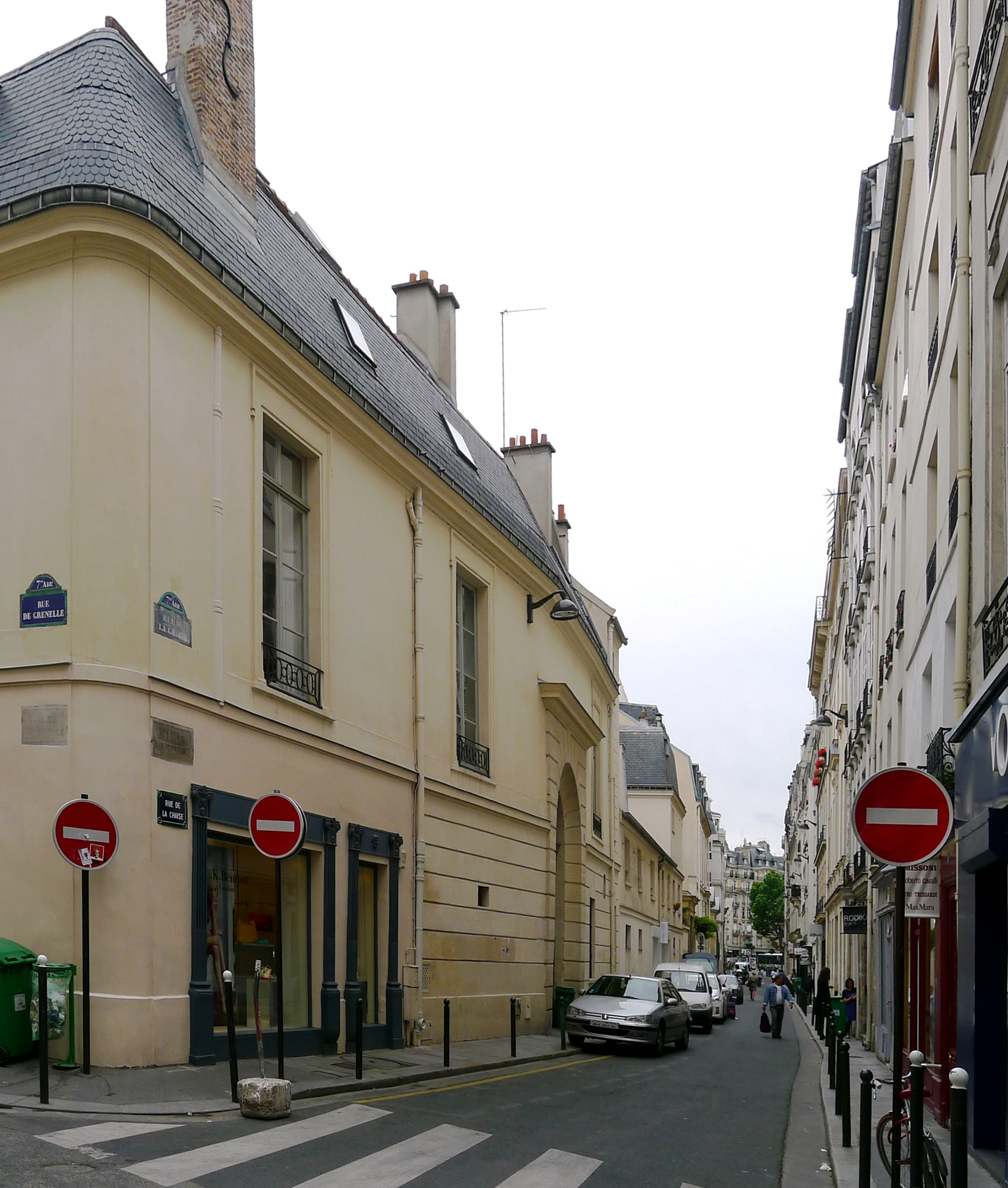 Rue de la Chaise - Paris VII